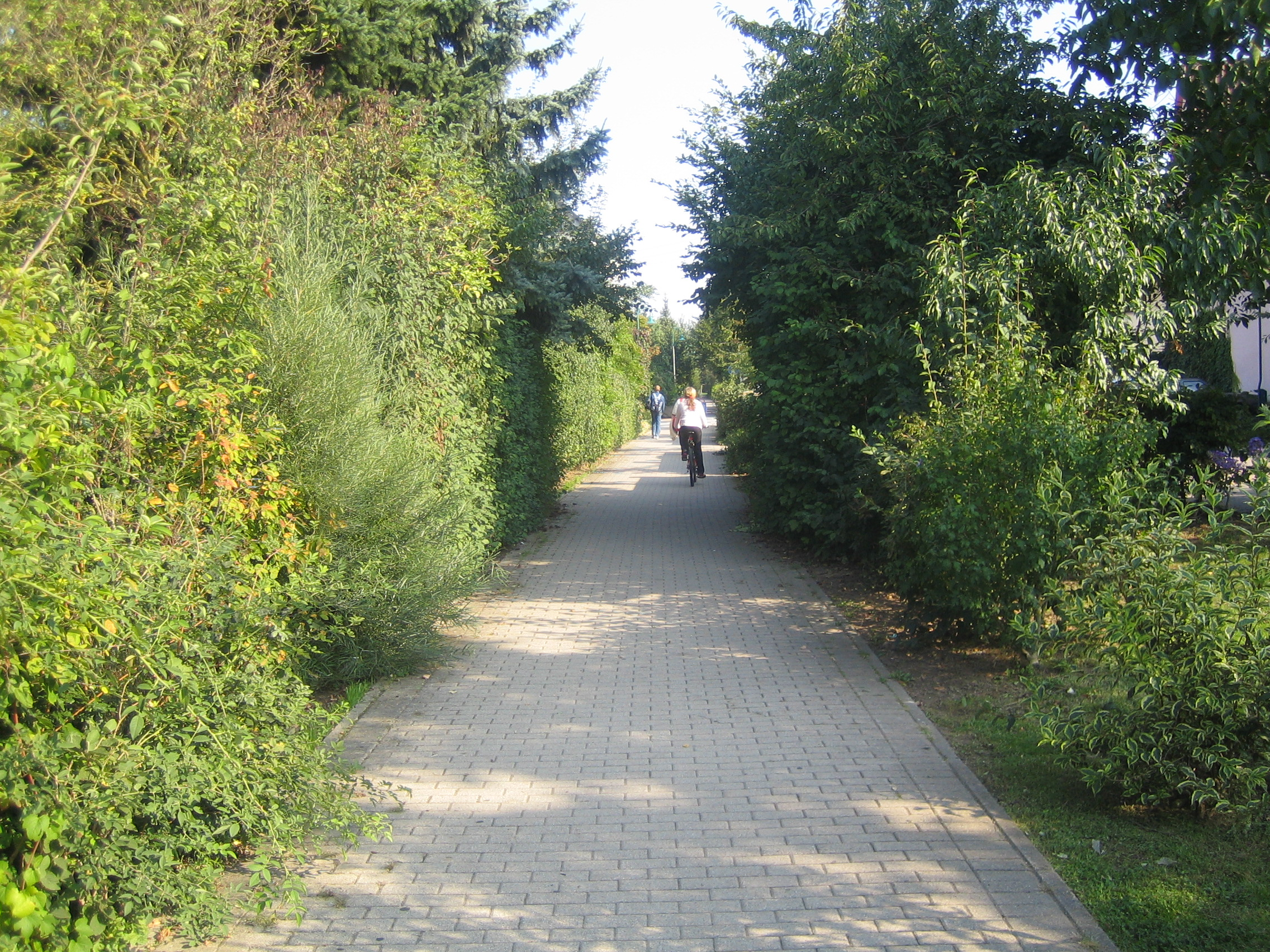 Radweg auf stillgelegter Strecke Odenheim-Hilsbach, selbst fotografiert